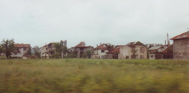 Zerstörte Häuser in Rajlovac bei Sarajevo.